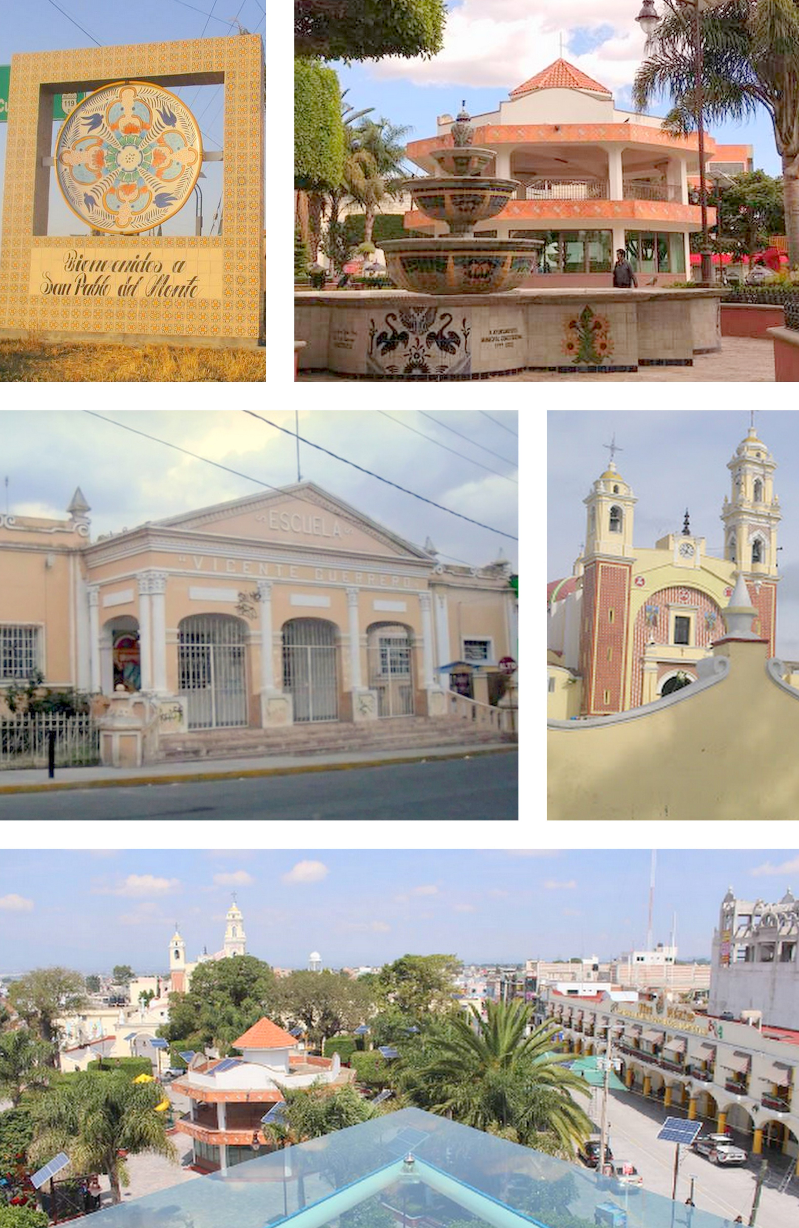 Montaje creado a partir de cinco imágenes en Wikimedia Commons: File:Parroquia de San Pablo Apóstol., San Pablo del Monte, Tlaxcala.jpg File:Parque de San Pablo del Monte.jpg File:Panorama de San Pablo del Monte.png File:Entrada San Pablo del Monte.jpg File:Esc Vicente Guerrero, SAN PABLO, TLAXCALA.jpg